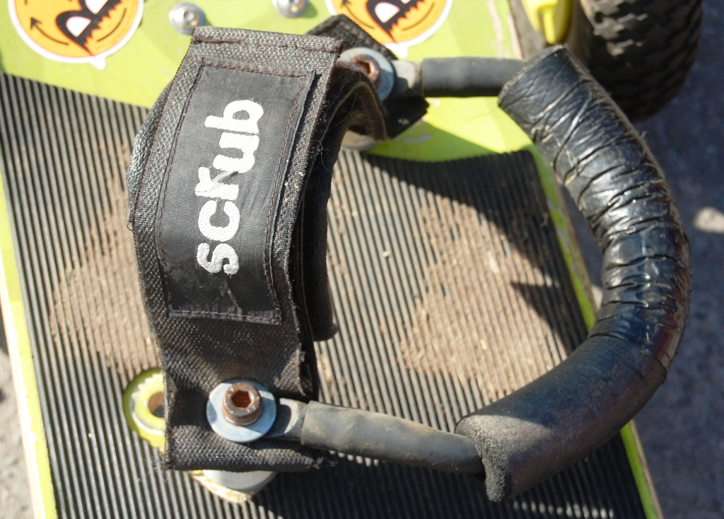 Fiacion de velcro